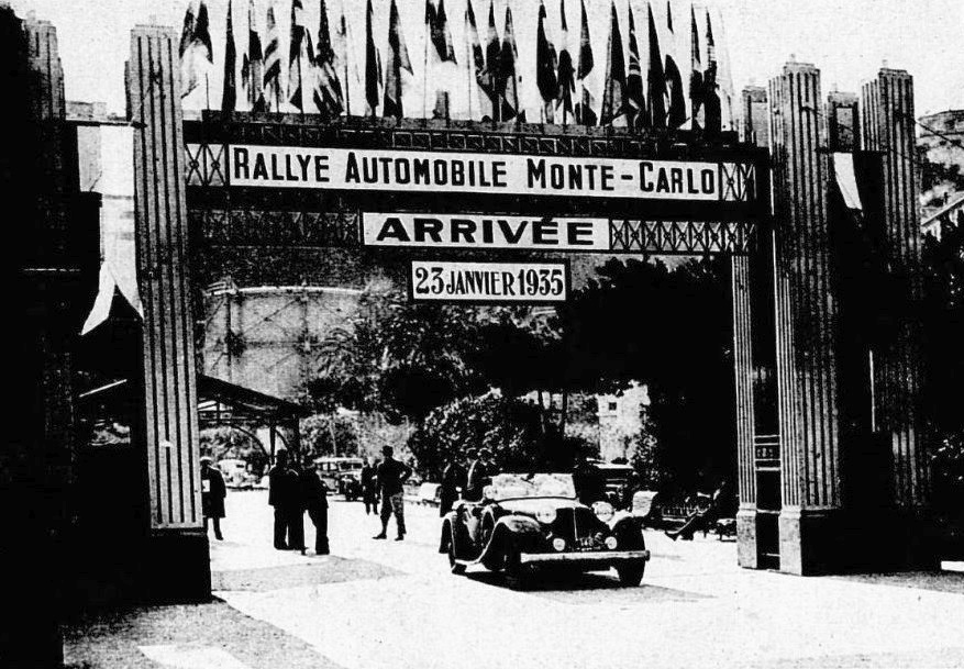 Rallye Monte-Carlo 1935, victoire de Charles Lahaye sur Renault Nervasport coupé spéciale, copilote René Quatresous